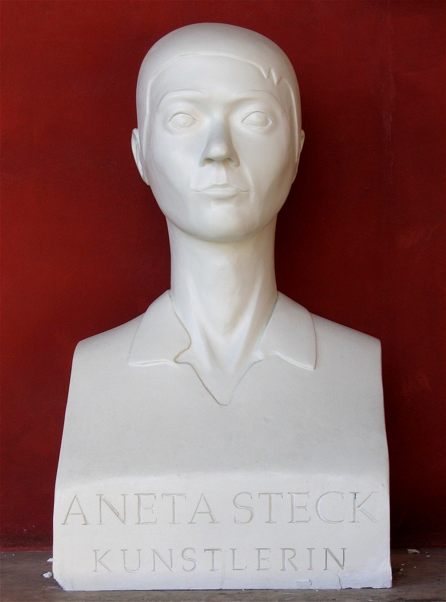 Gipsbüste Aneta Steck, Ruhmeshalle Muenchen, wurde heimlich aufgestellt und stand dort fast 7 Monate.